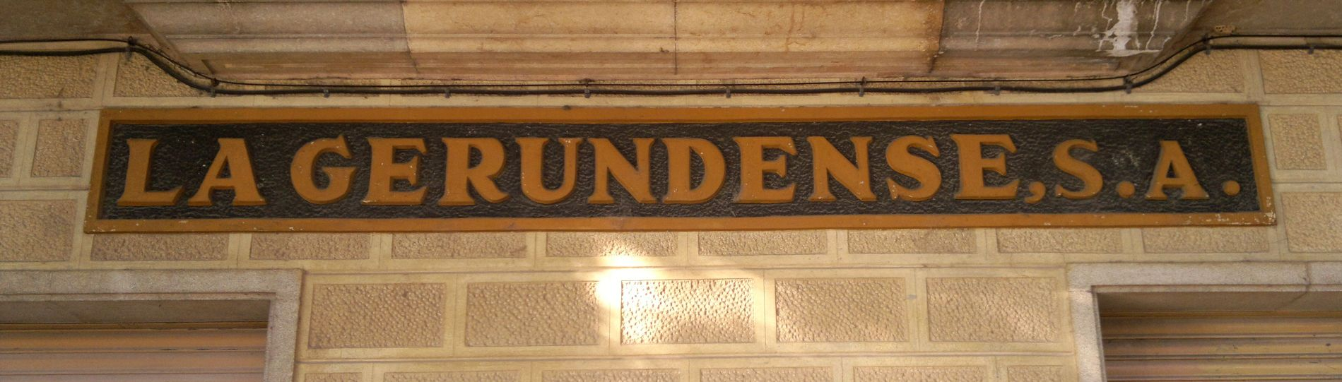 Antic rètol de "La Gerundense, S.A", empresa paperera de Girona que va tancar el 1973